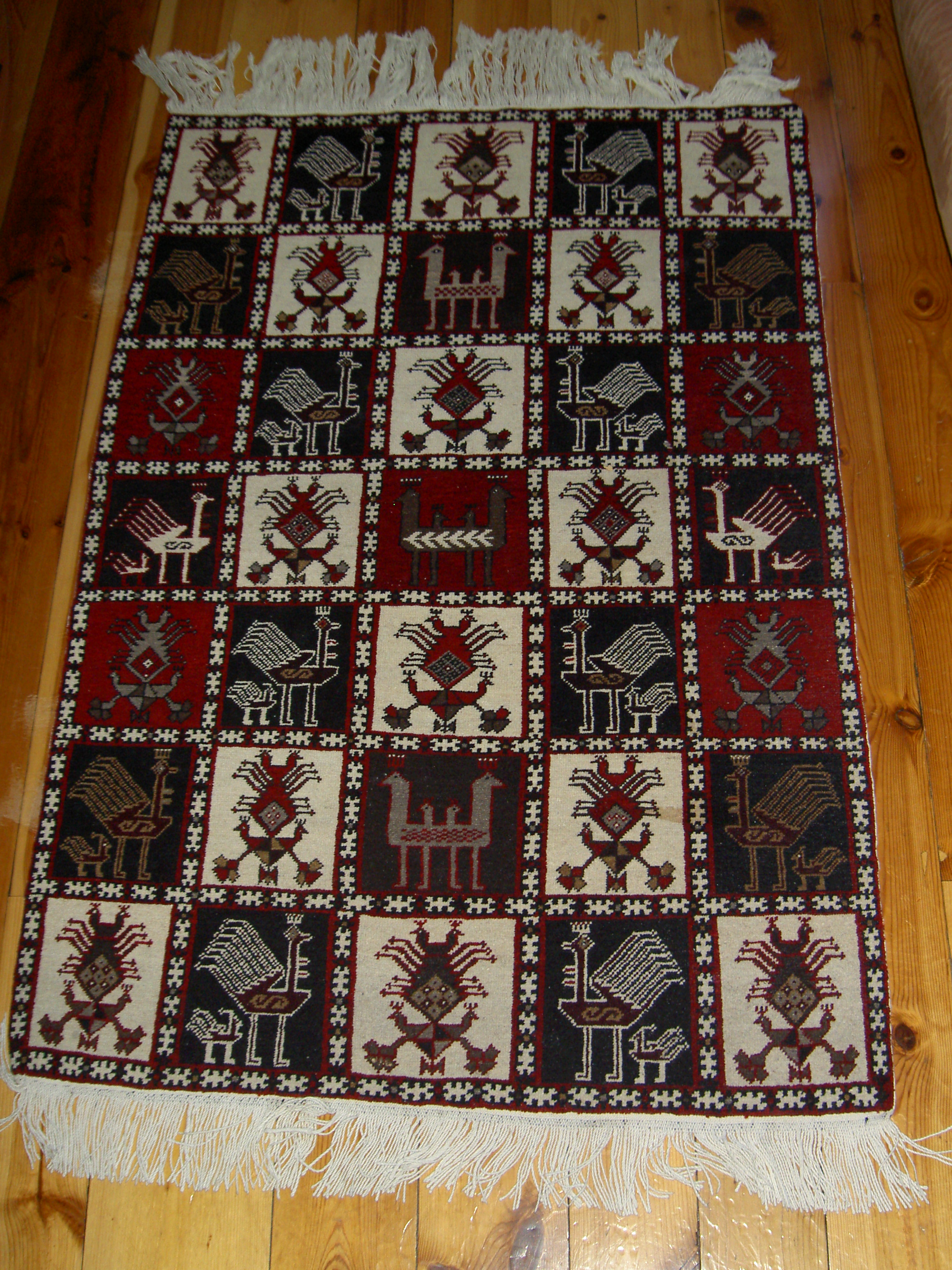 En matta